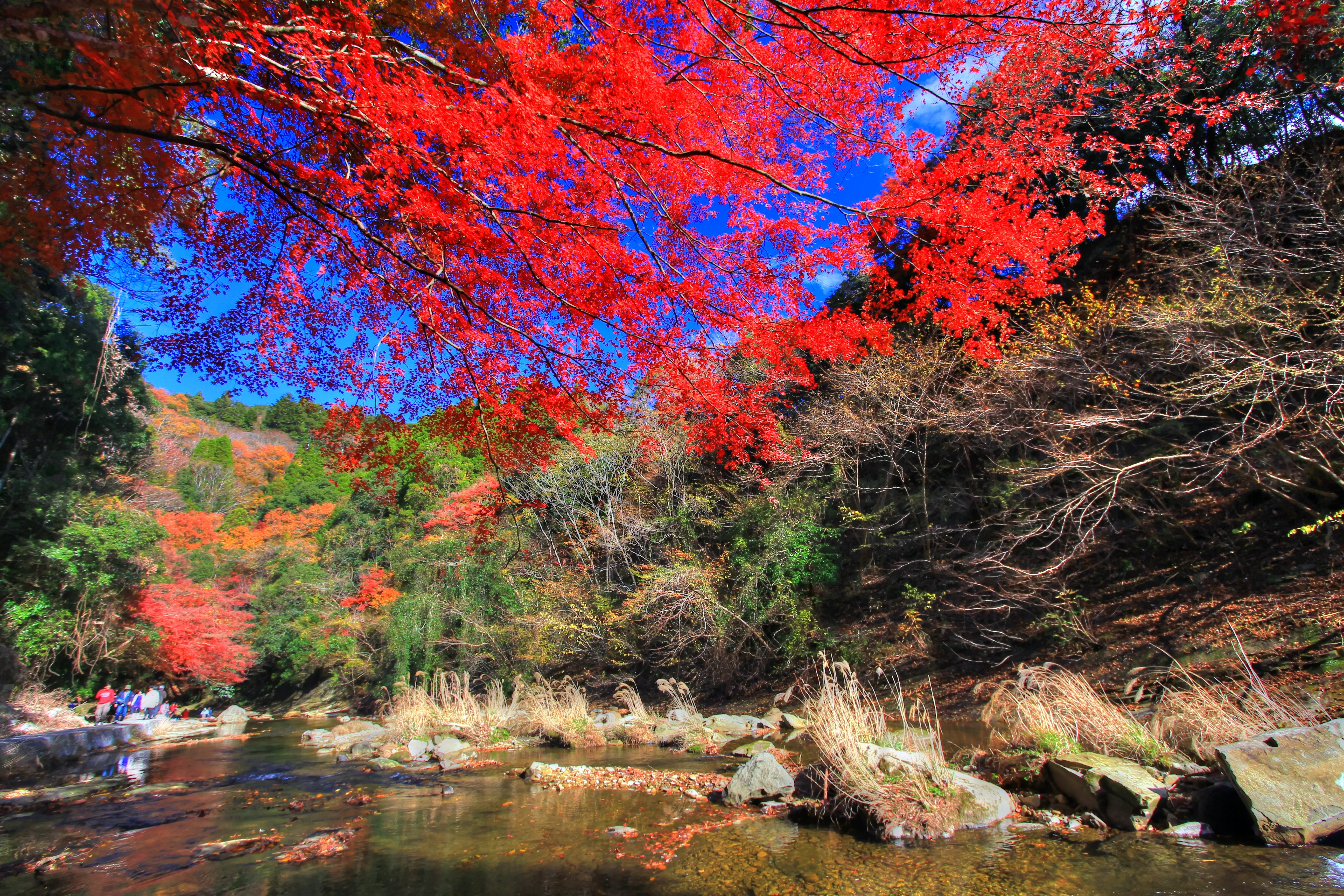 粟又の滝遊歩道